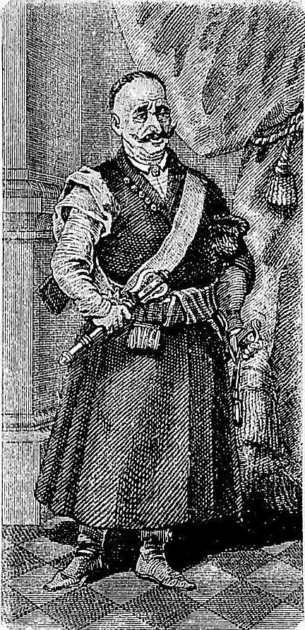 Mikołaj Bazyli Potocki 1707/08-1782, starosta kaniowski